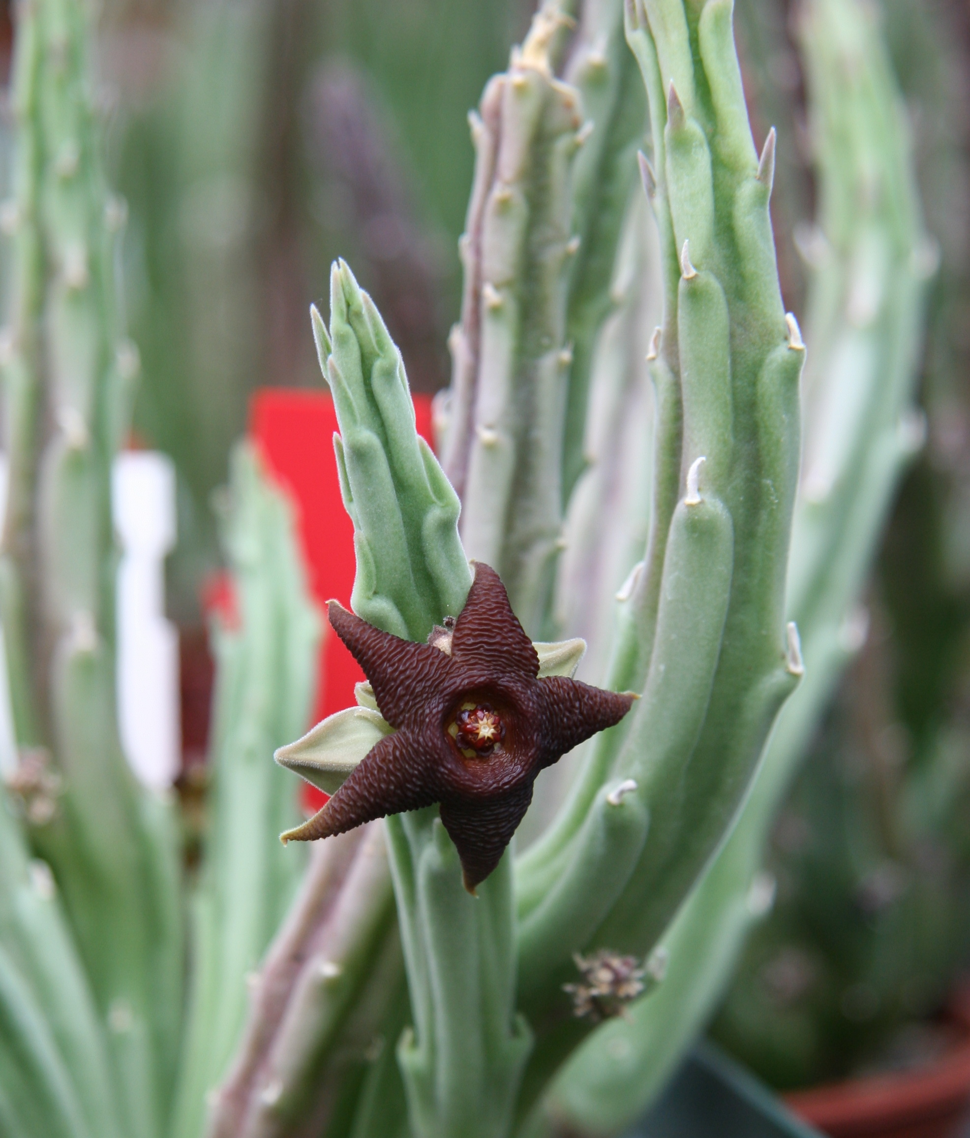 Stapelia kwebensis in der Gärtnerei Flores-Reinecke, Leverkusen